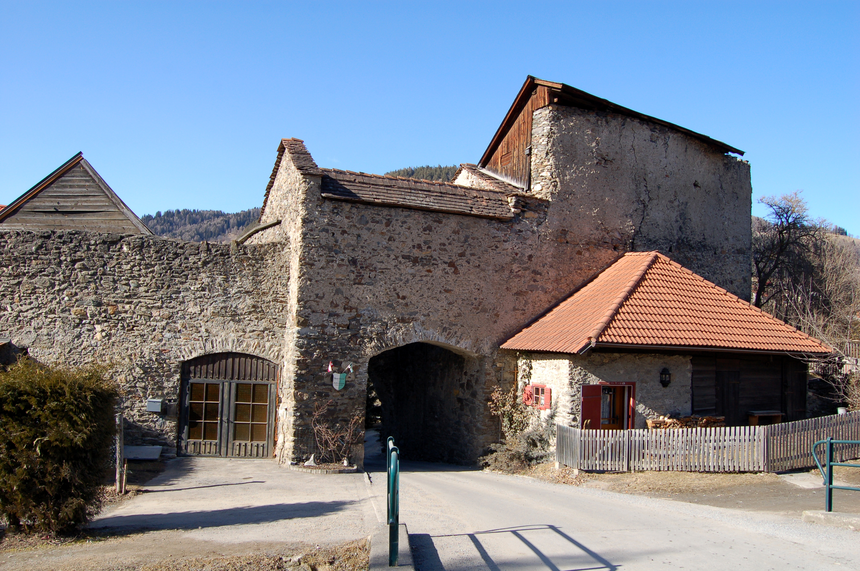 Neugassentor (14. Jh.) in Oberwölz, Steiermark. Ostseite der Stadtmauer